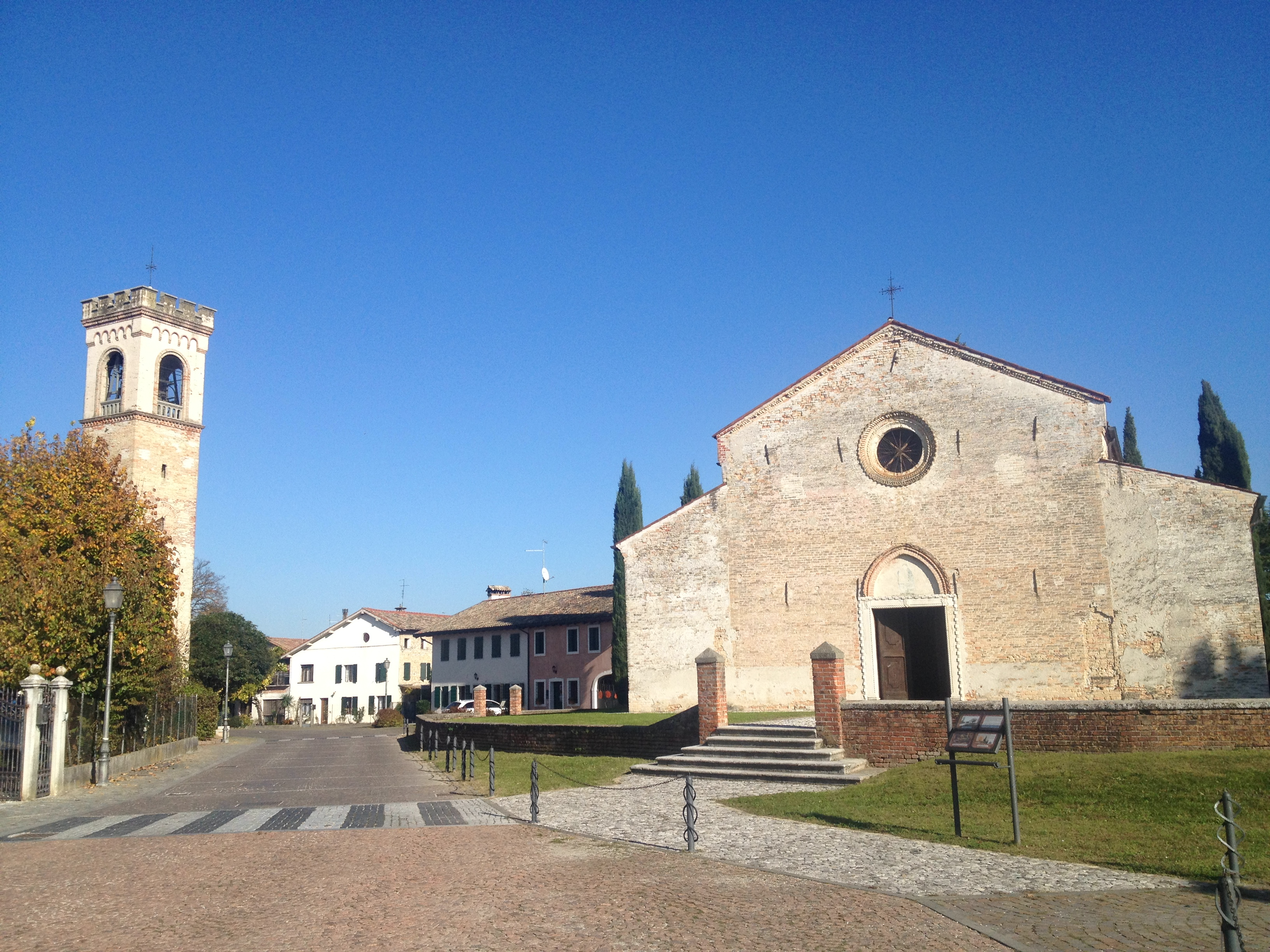 Cordovado - Duomo di Sant'Andrea